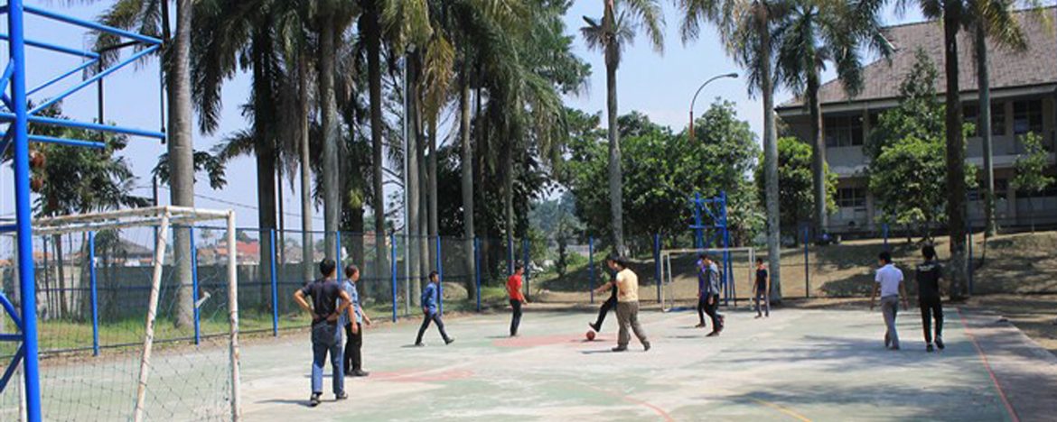 Lapangan Indoor